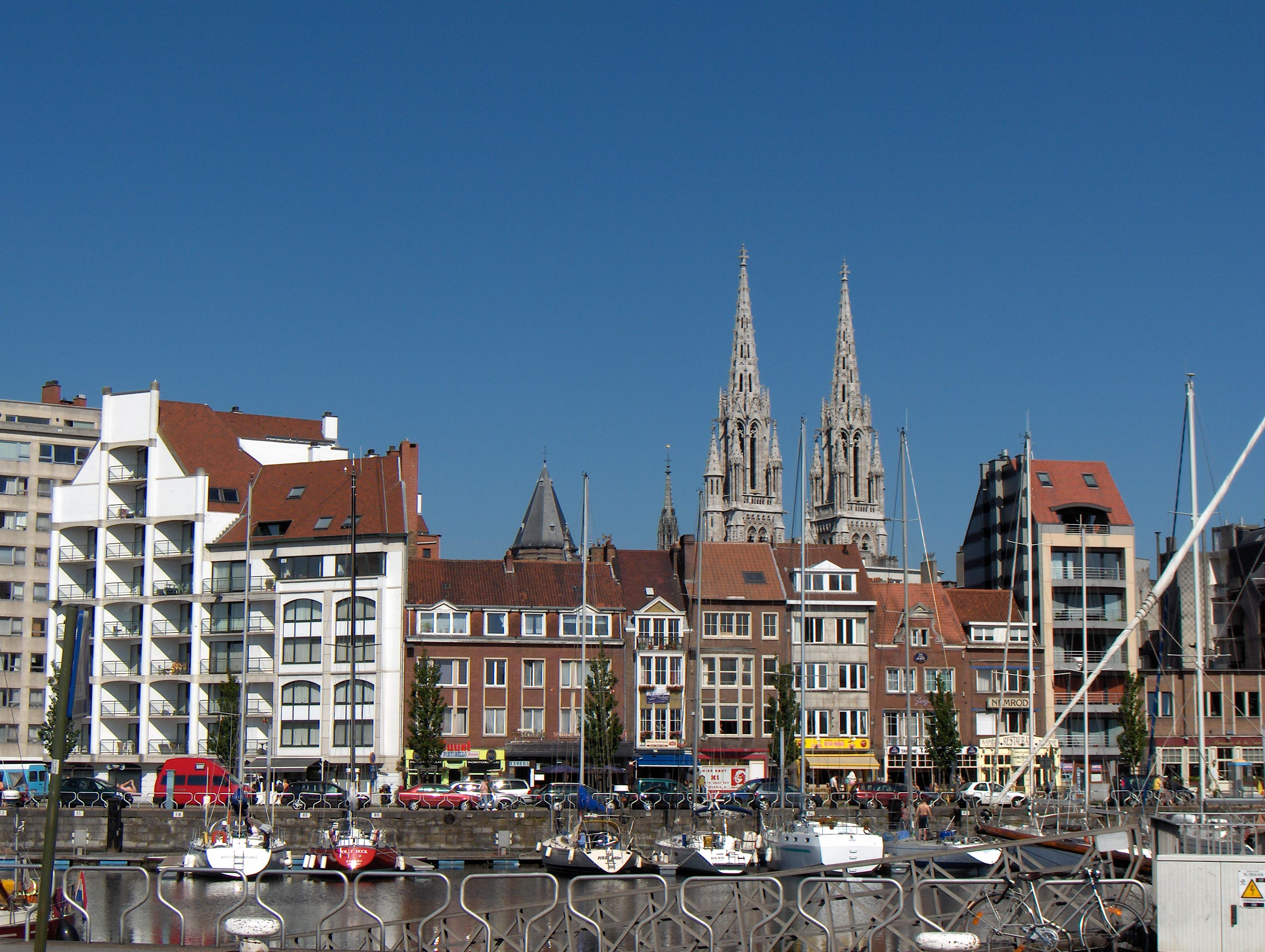 Beschreibung: Ostende (Belgien, Prov. Westflandern), Hafen und Petri- und Paulikirche. Blick vom Bahnhofplatz. Datum: 10. Juni 2006 Fotograf: Friedrich Tellberg